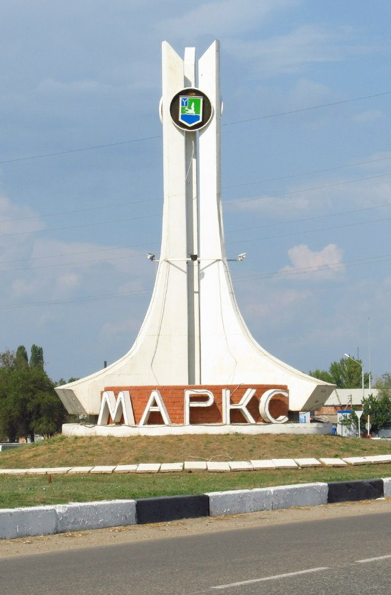 Стела города Маркса